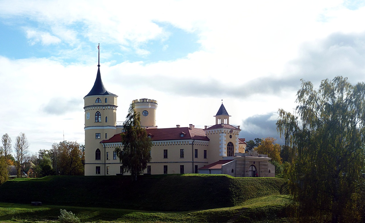 парк Мариенталь, крепость БИП